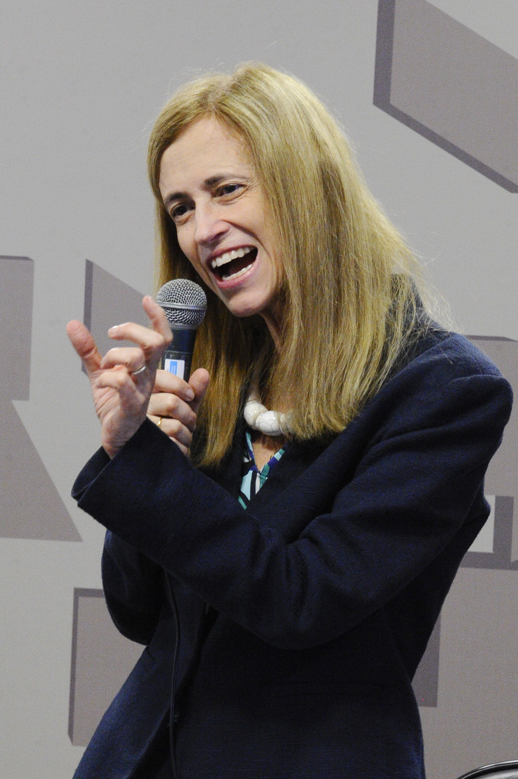 Comissões de Assuntos Sociais (CAS) e de Educação, Cultura e Esporte (CE) realiza audiência conjunta para discutir importância do desenvolvimento de competências sociais para o ingresso no mercado de trabalho. Em pronunciamento, especialista em Políticas Públicas e ex-Secretária Municipal de Educação do Rio de Janeiro, Claudia Costin. Foto: Edilson Rodrigues/Agência Senado